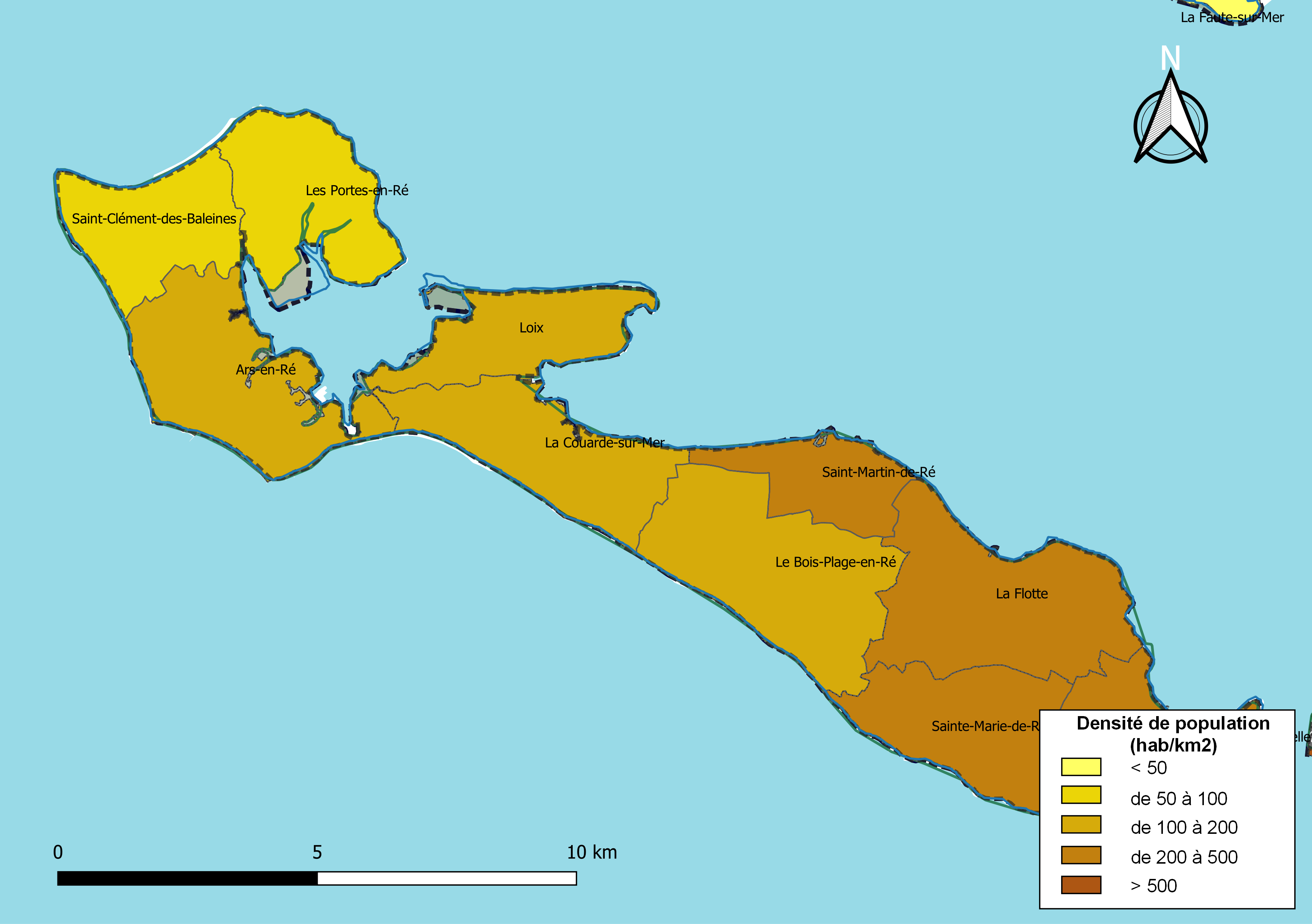 Carte des densités de population (millésimée 2016) des communes de la communauté de communes la Communauté de communes de l'île de Ré, département de la Charente-Maritime, France. Composition au 1er janvier 2019.